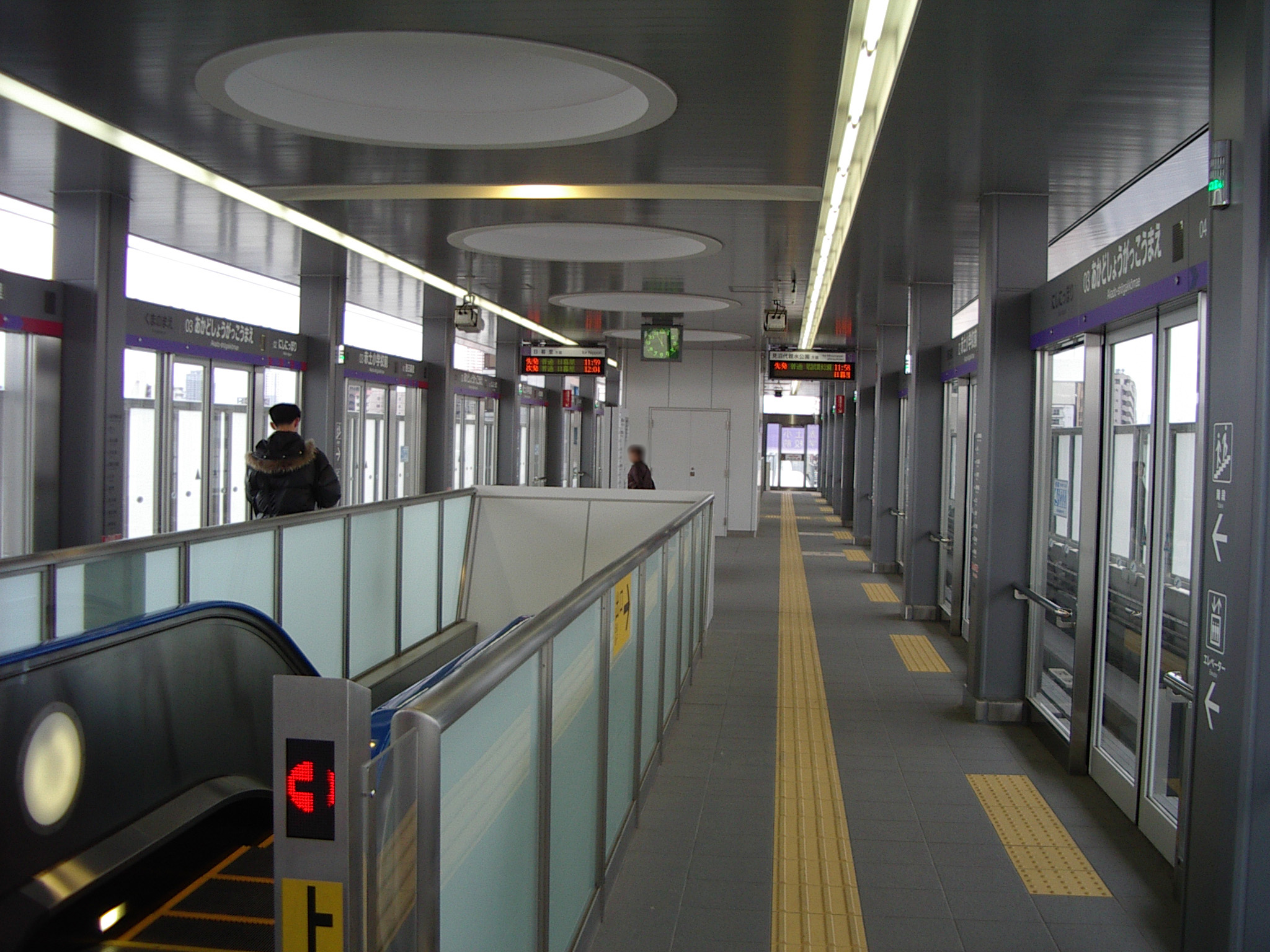 日暮里・舎人ライナー赤土小学校前駅